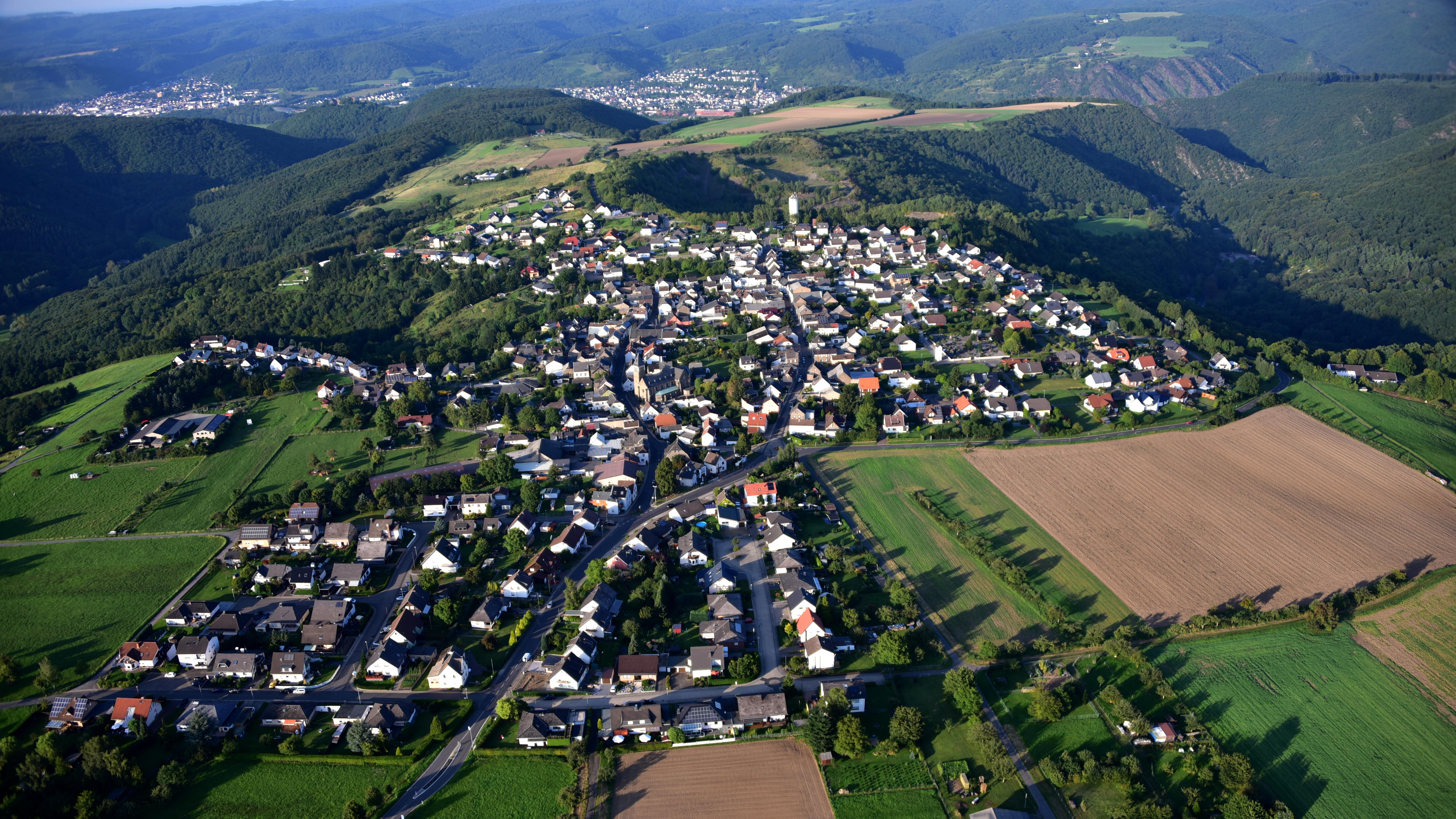 Niederlützingen, Luftaufnahme (2017)